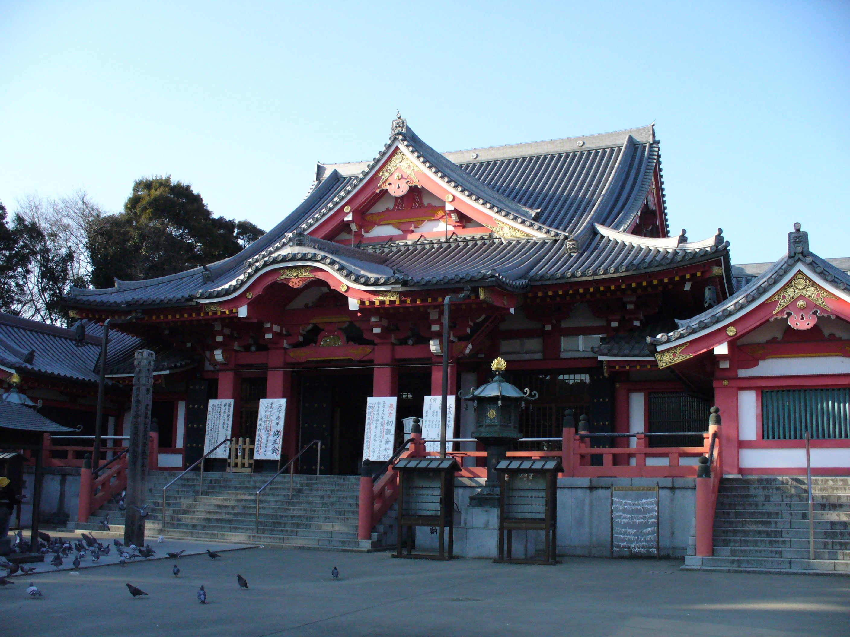 Jimokuji Hondo（甚目寺本堂）